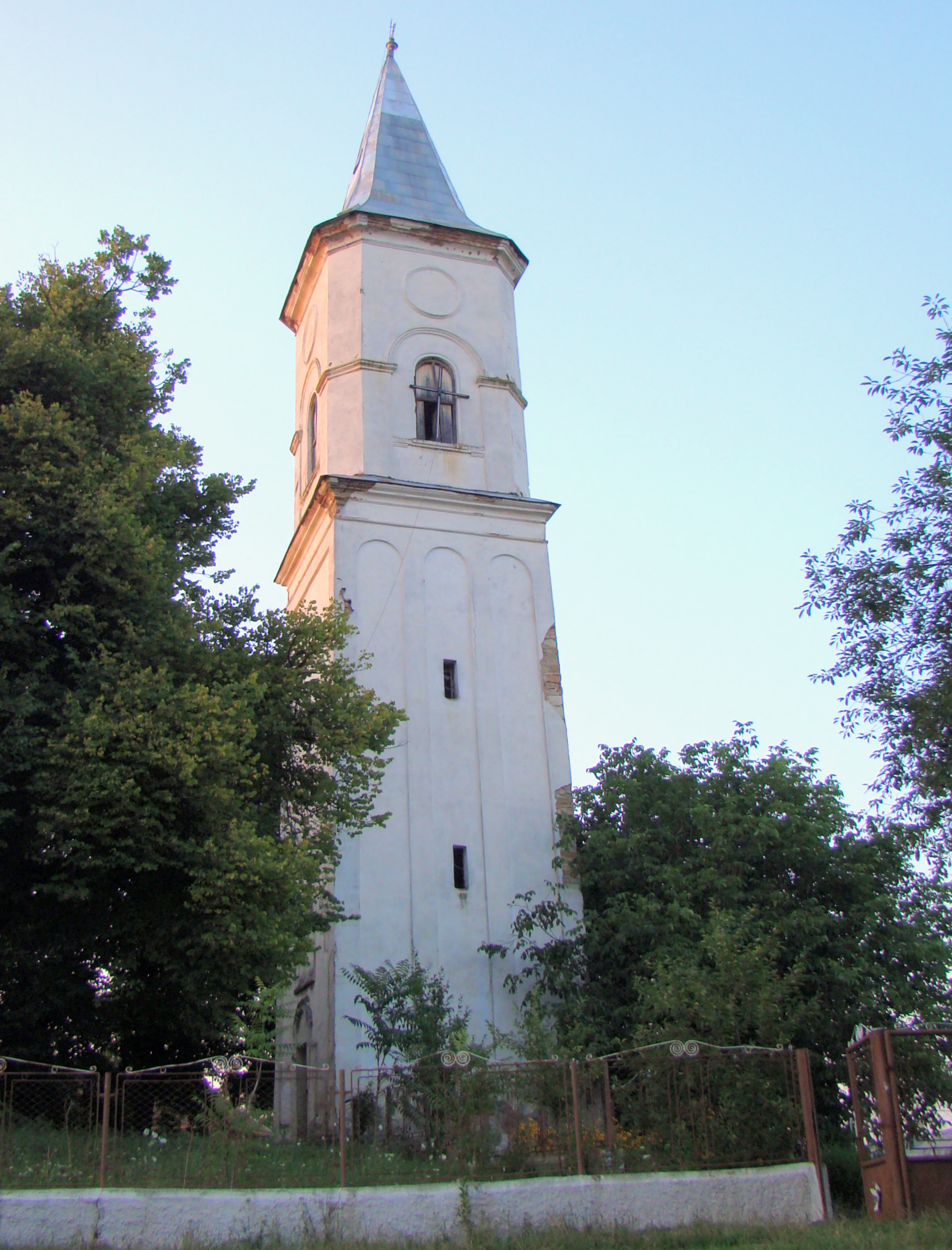 Biserica ortodoxă din Sângeorzu Nou (fosta biserică evanghelică)